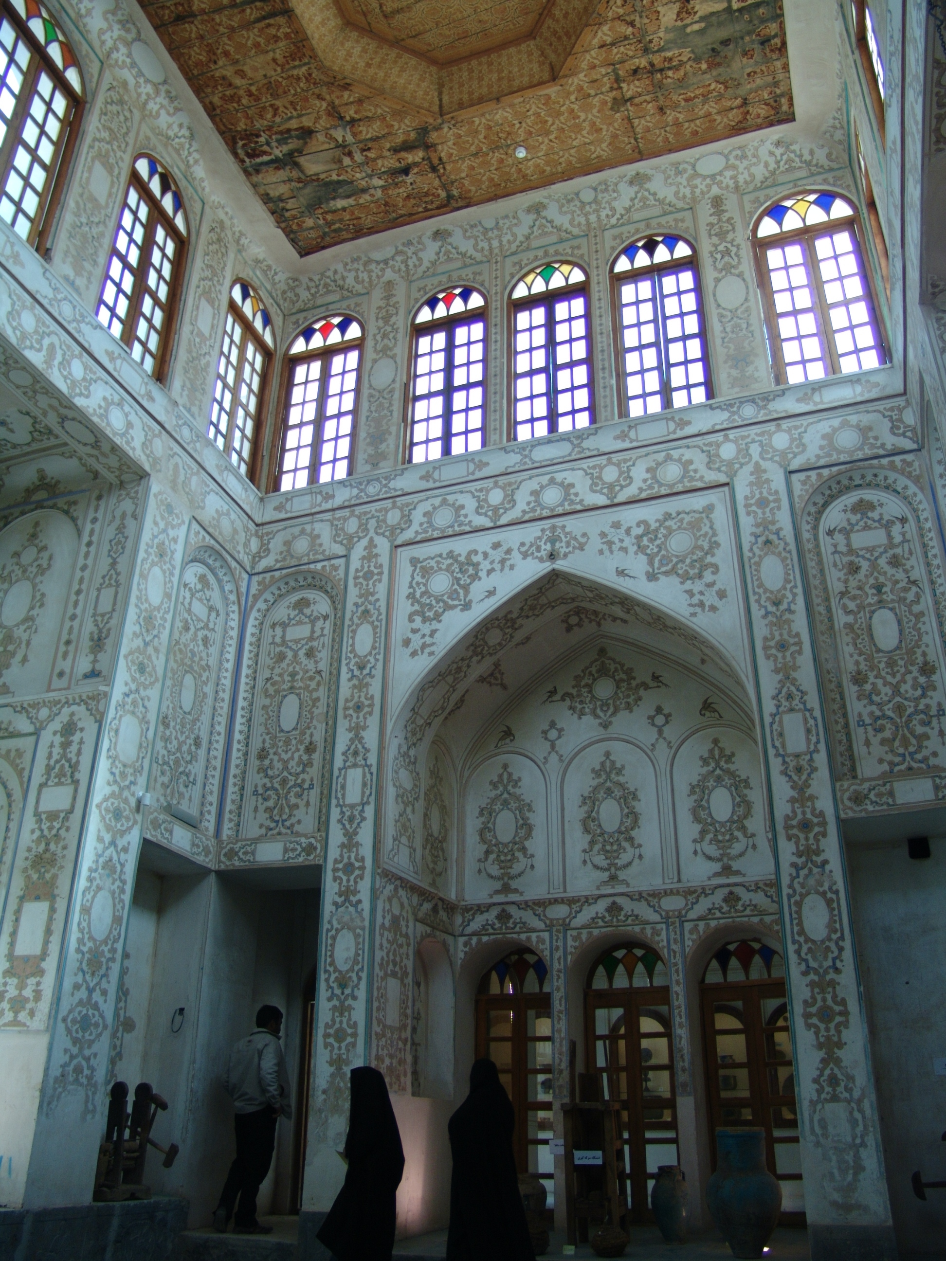 خانه سرتیب حاج محمدحسین خان امینی سده‌ای